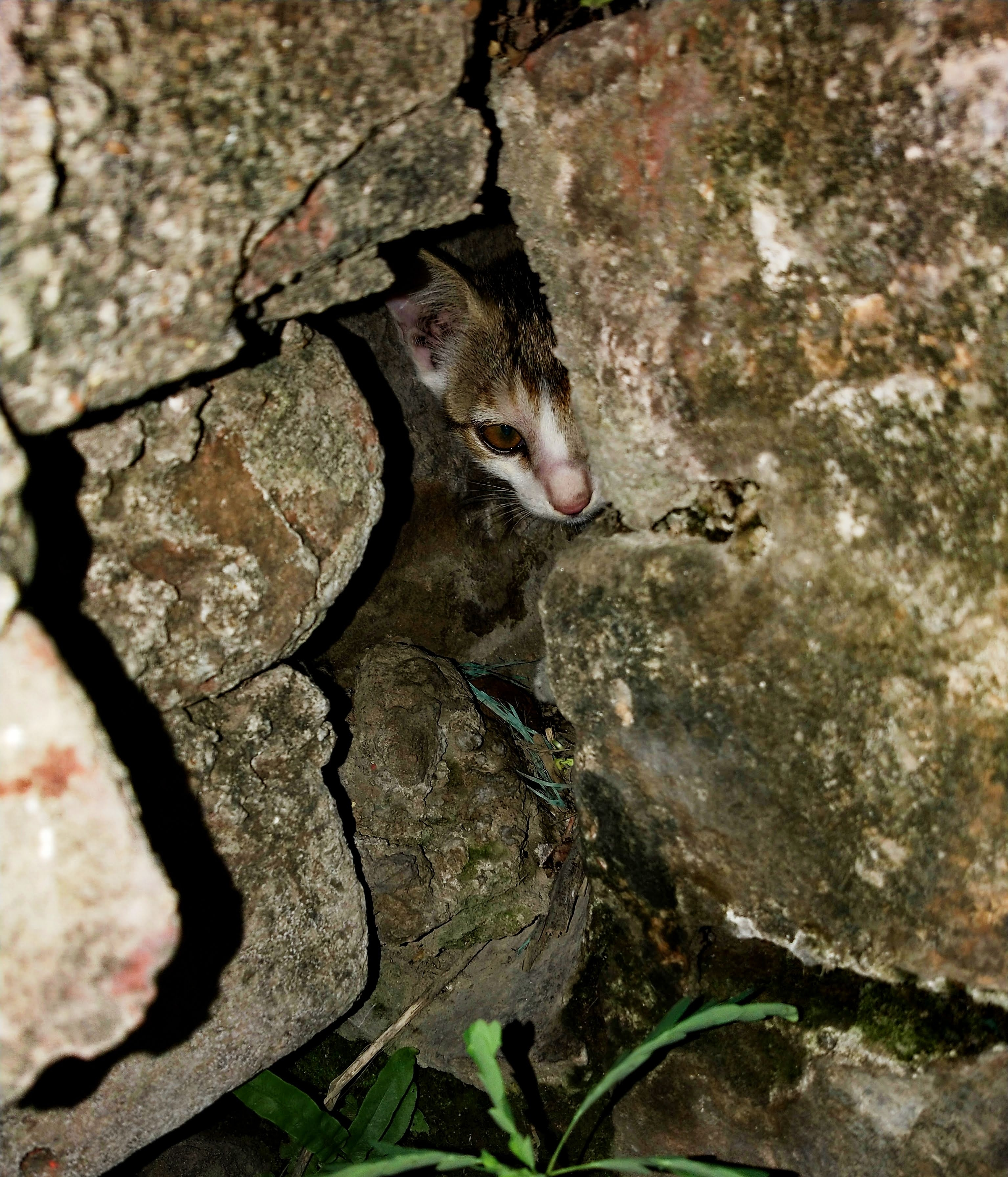 Cat behind a rock